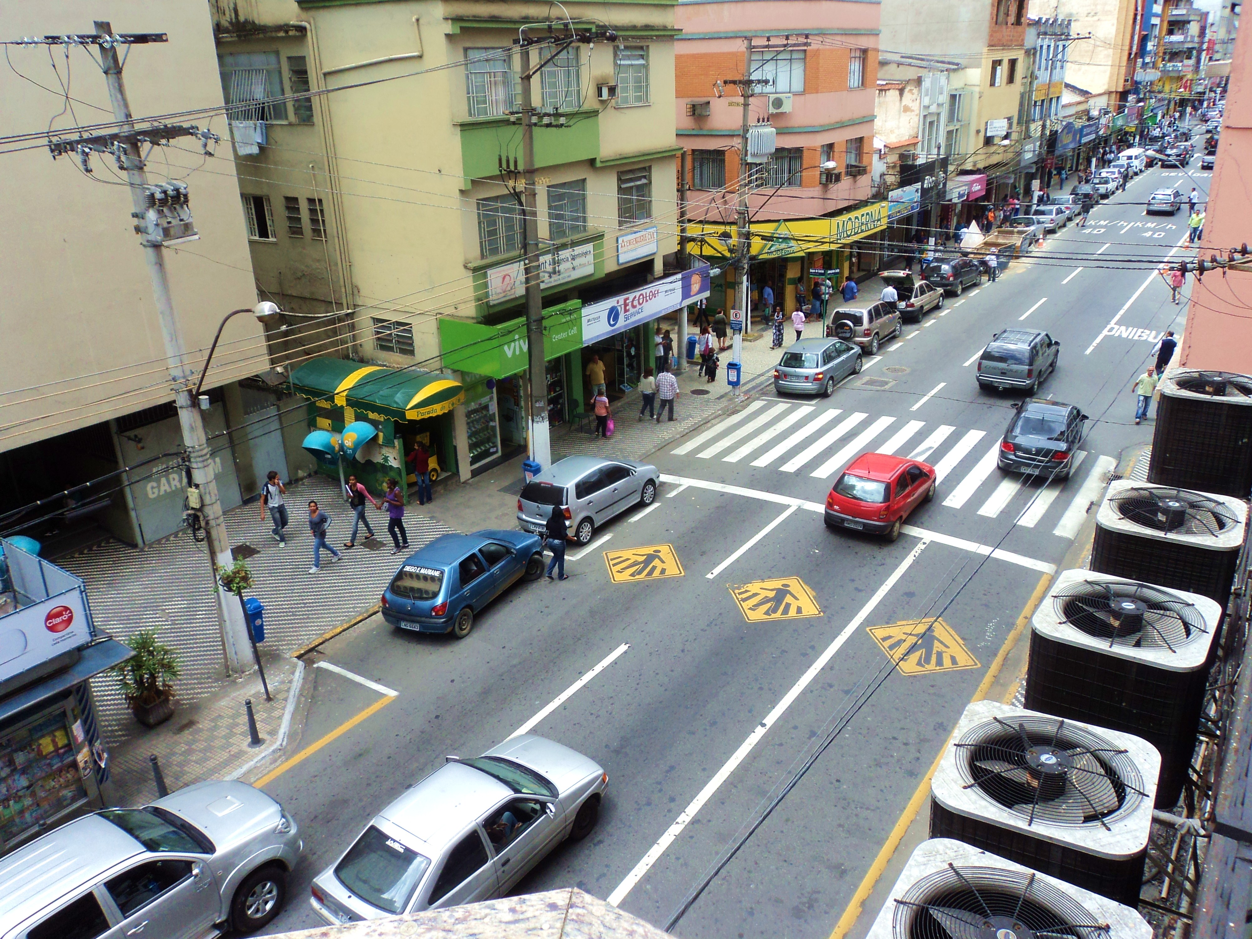 Avenida Joaquim Leite, A Principal via do centro da cidade de Barra Mansa, estado do Rio de Janeiro, Brasil.